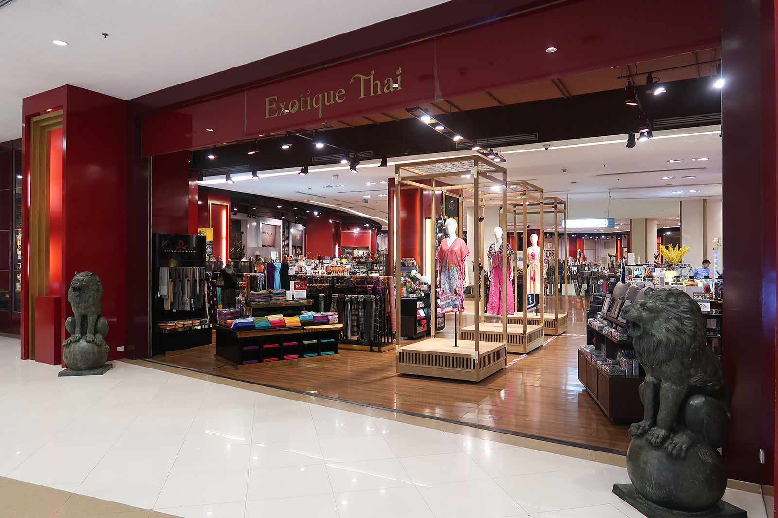 Siam Paragon Level 4 Exotique Thai